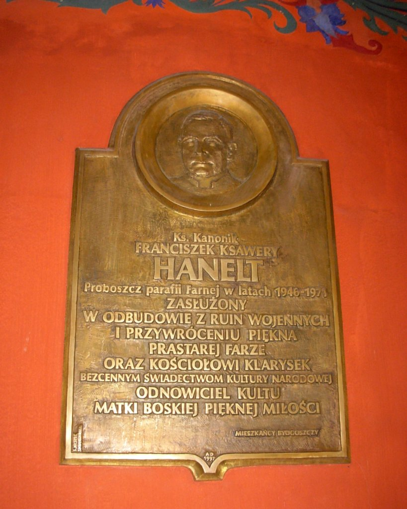 Mosiężna tablica poświęcona pamięci ks. Franciszka Ksawerego Hanelta, proboszcza Fary w latach 1946-71 (który odnowił Farę i kościół klarysek oraz przywrócił kult Matki Bożej Bydgoskiej), z portretem zmarłego w medalionie (1997). Znajduje się na ścianie południowej, obok ołtarza św. Rocha.